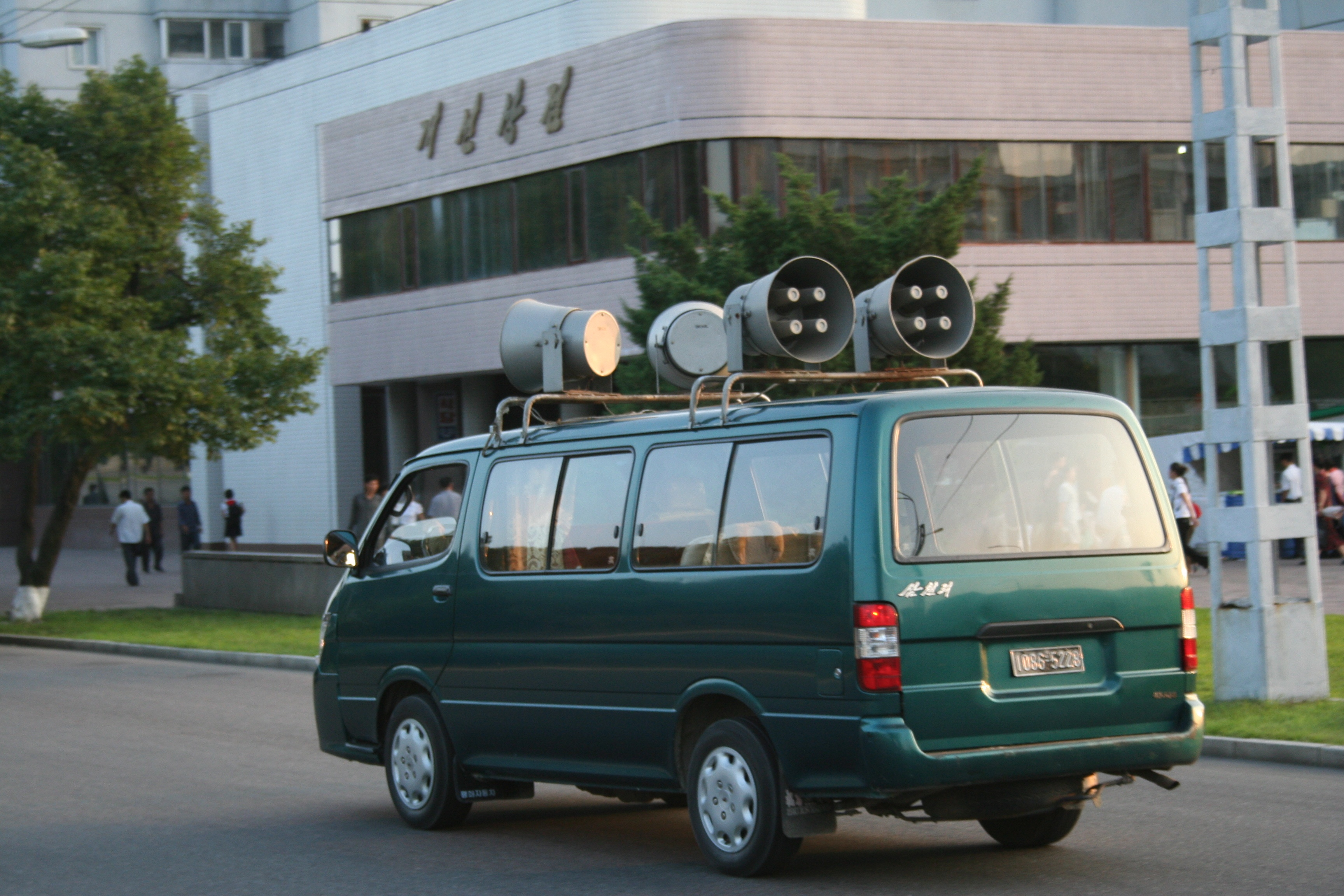 Pyongyang